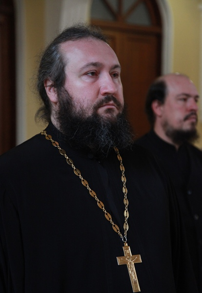 Первый проректор СПДС игумен Варфоломей (Денисов) ноябрь 2013